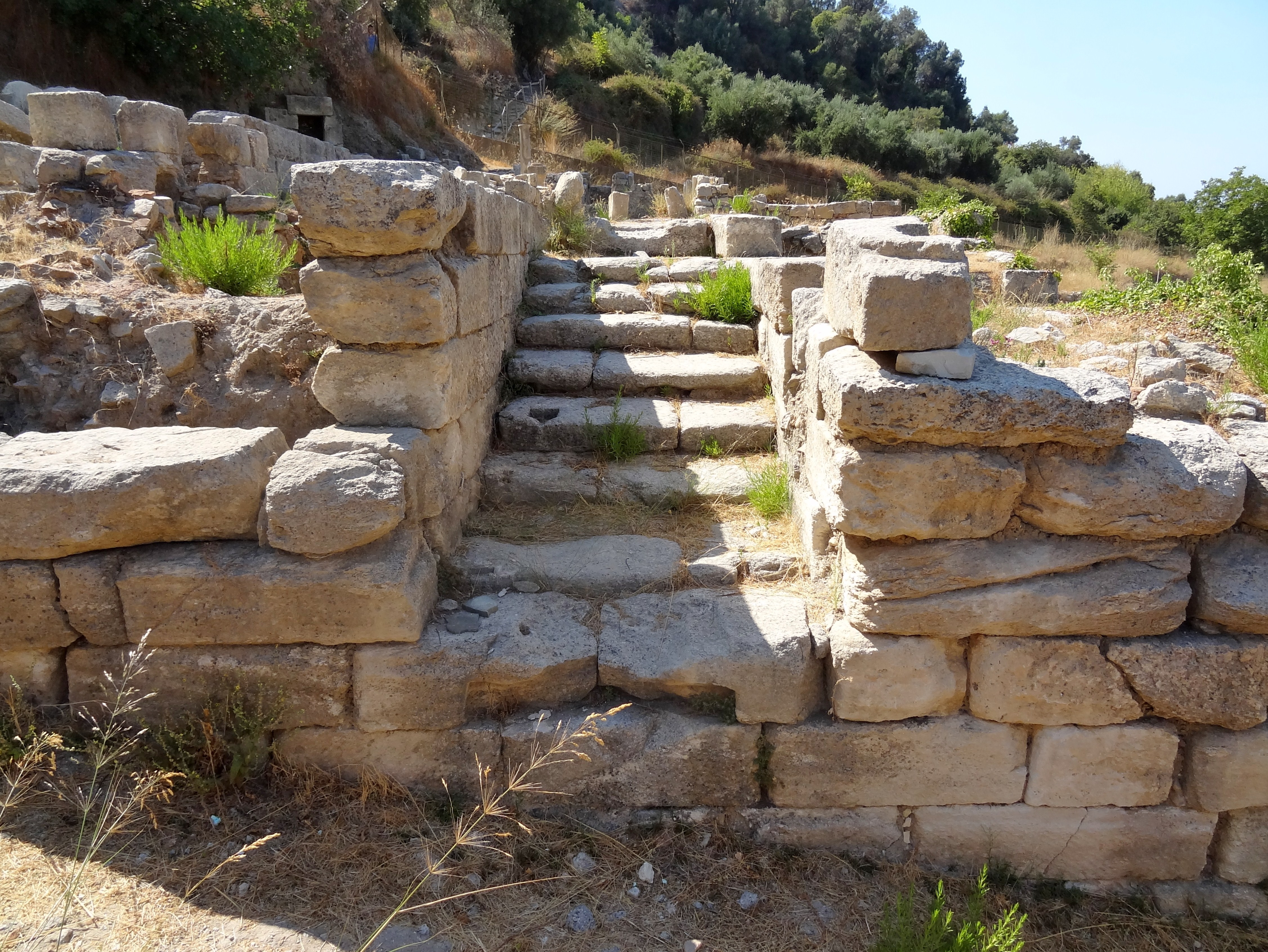 Ausgrabungsstätte von Eleutherna (Ἐλευθέρνα), Gemeinde Rethymno, Regionalbezirk Rethymno, Kreta, Griechenland